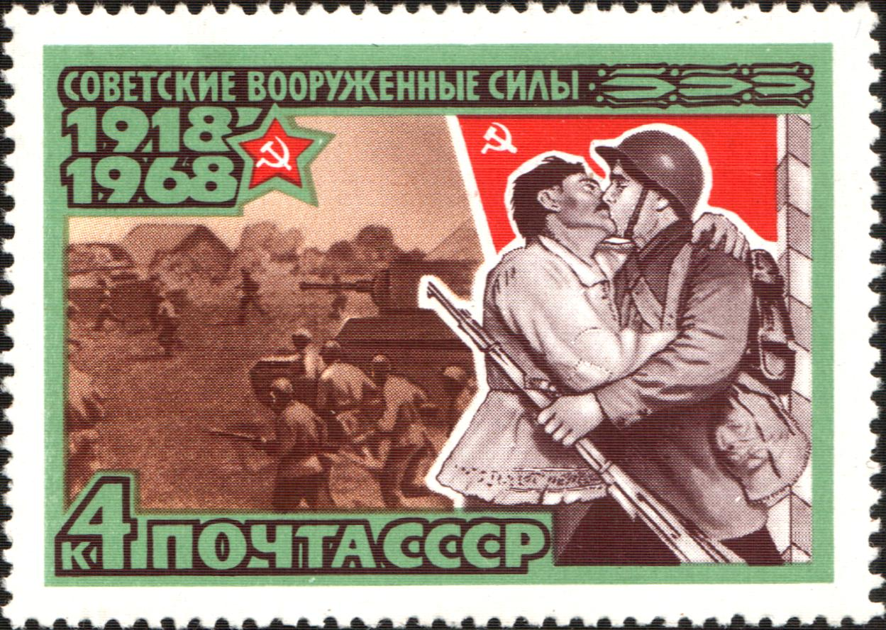 Почтовая марка СССР - 50 лет Вооруженных Сил СССР